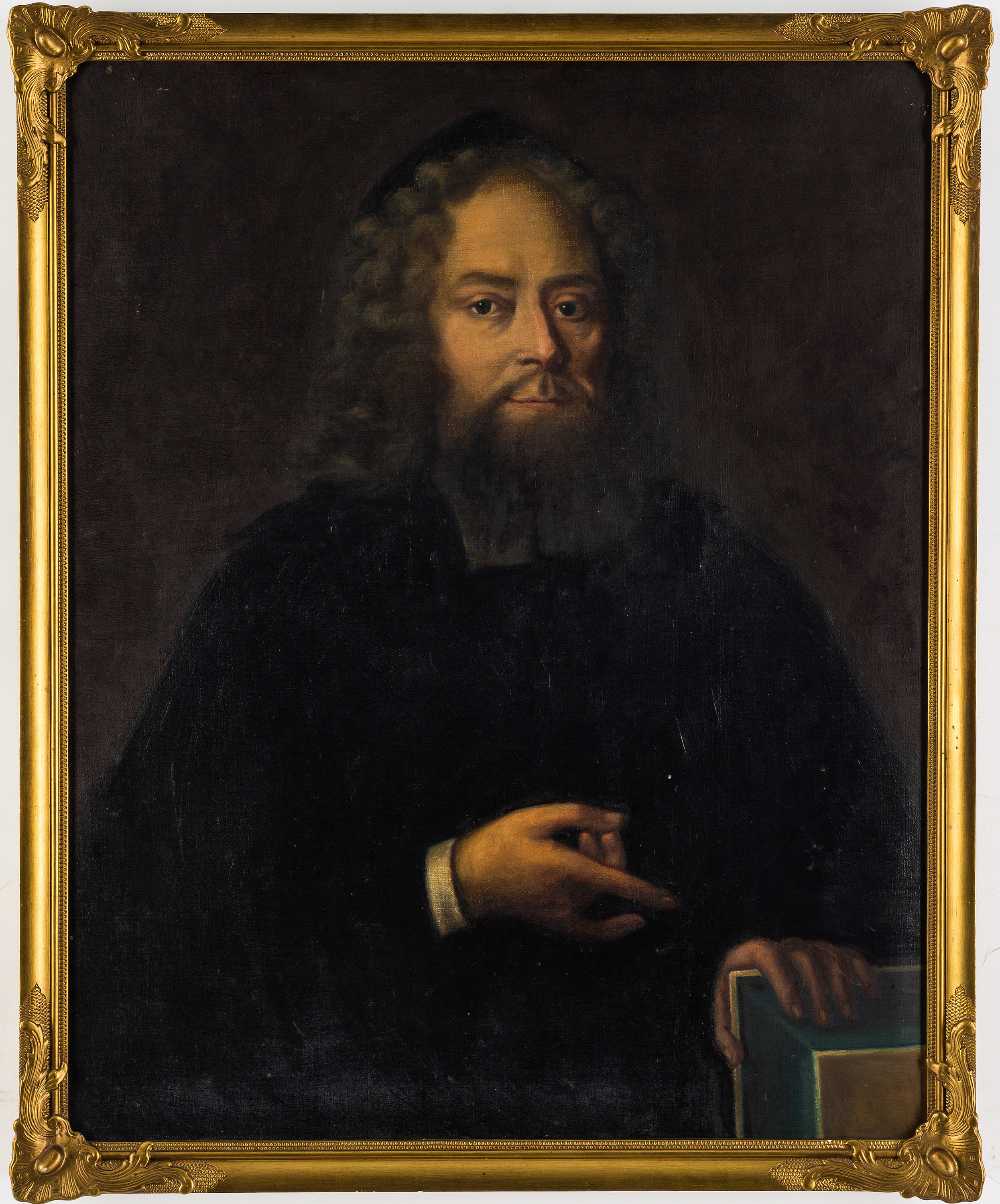 Gustaf Adolf Humble (1674-1741), biskop i Växjö. Iklädd prästkappa med elva, samt hållandes och petades mot bibeln